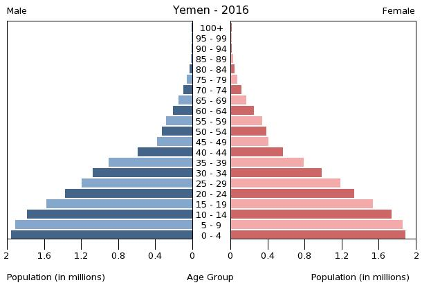 A population pyramid illustrates the age and sex structure of a country's population and may provide insights about political and social stability, as well as economic development. The population is distributed along the horizontal axis, with males shown on the left and females on the right. The male and female populations are broken down into 5-year age groups represented as horizontal bars along the vertical axis, with the youngest age groups at the bottom and the oldest at the top. The shape of the population pyramid gradually evolves over time based on fertility, mortality, and international migration trends.